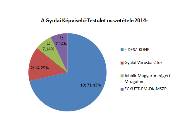 A Gyulai Képviselő-testület összetétele 2014-től